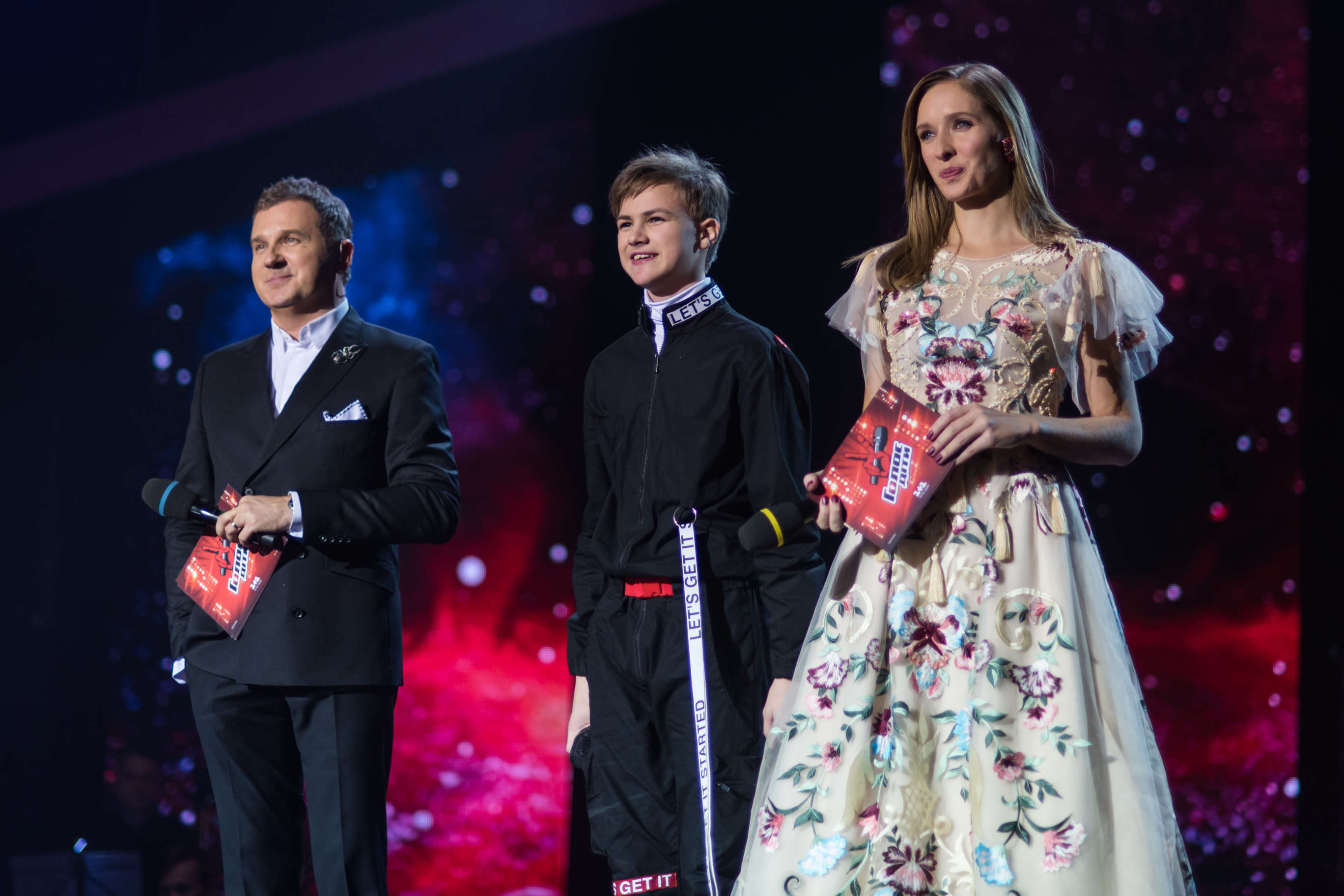 Финал Голос. Дiти 4. Юрий Горбунов, Саша Минёнок и Екатерина Осадчая